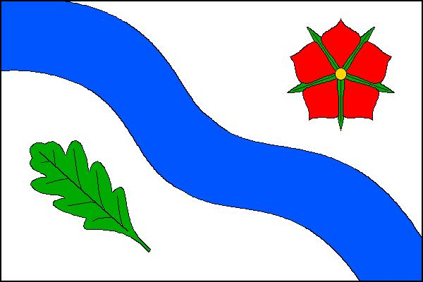 Vlajka obce Lužnice (okres Jindřichův Hradec)